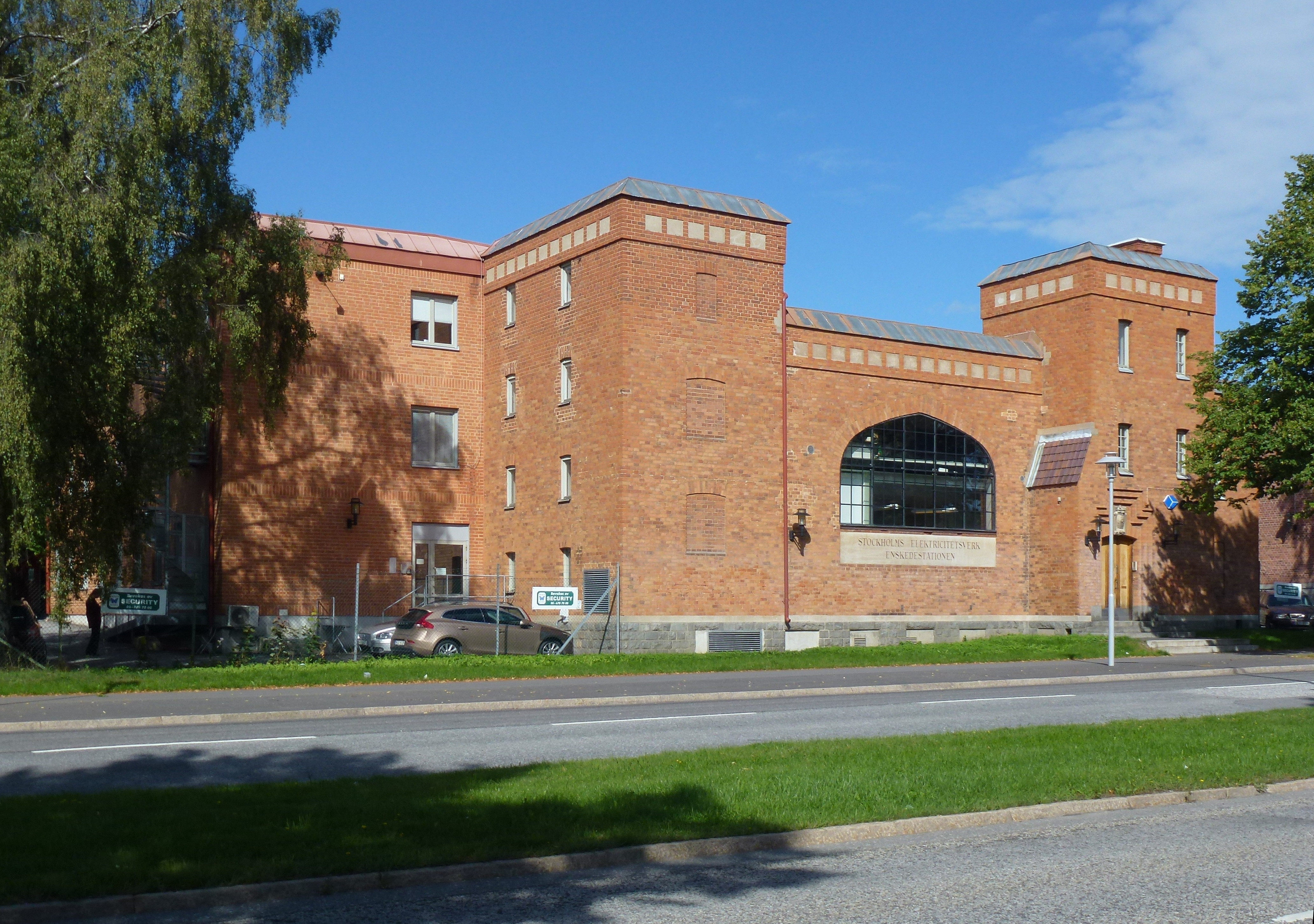 Enskedestationen